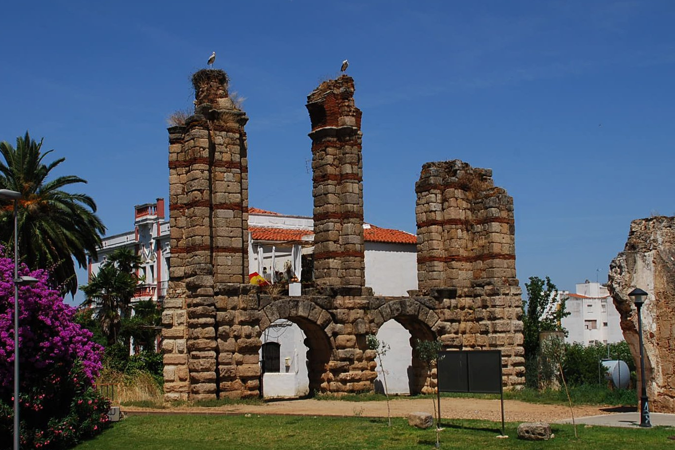 Acueducto Romano San Lázaro en Mérida, provincia de Badajoz (España).